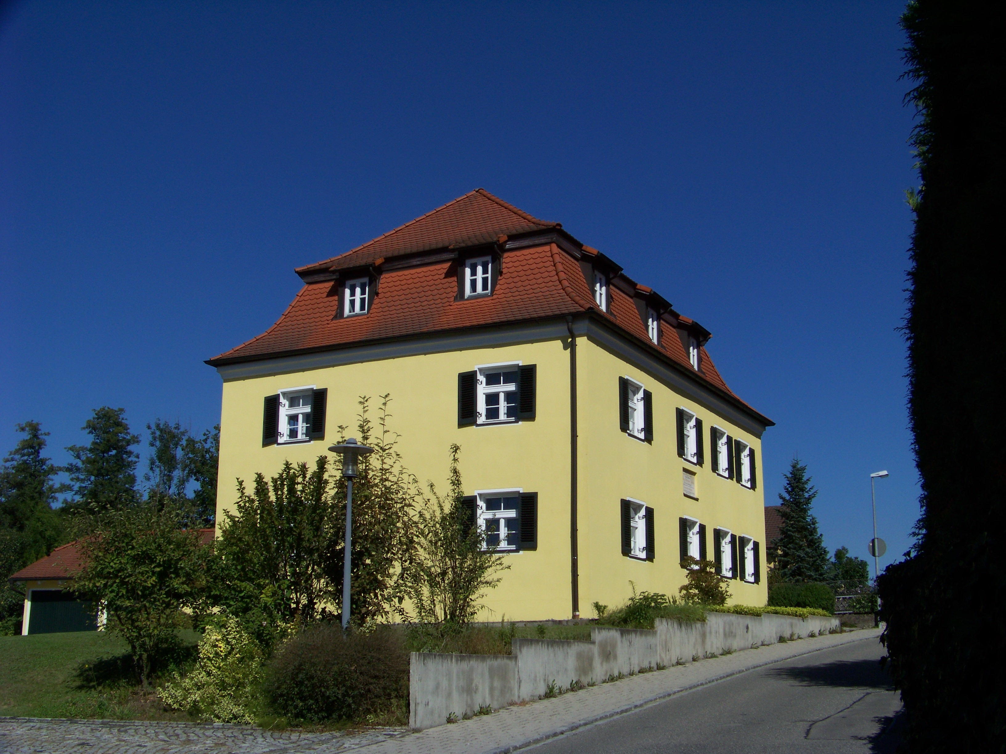 Bogen, Mussinanstraße 7. Mussinanhaus. Wohnbau mit Mansardwalmdach, 1. Viertel 19. Jahrhundert. Ehemaliges Wohnhaus seiner Exzellenz Ludwig Ritter von Mussinan.